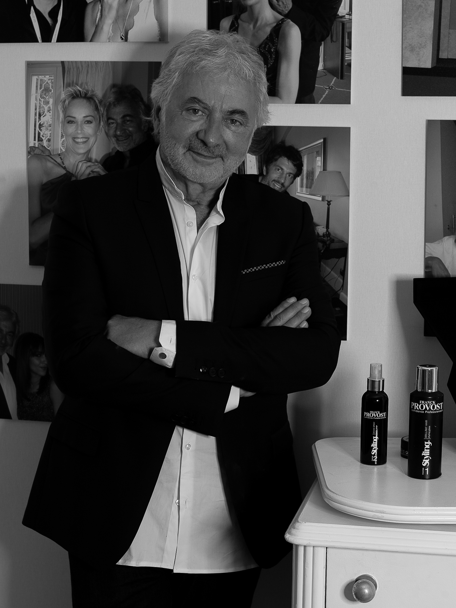 Franck Provost pendant le Festival de Cannes 2017 dans sa suite du Martinez